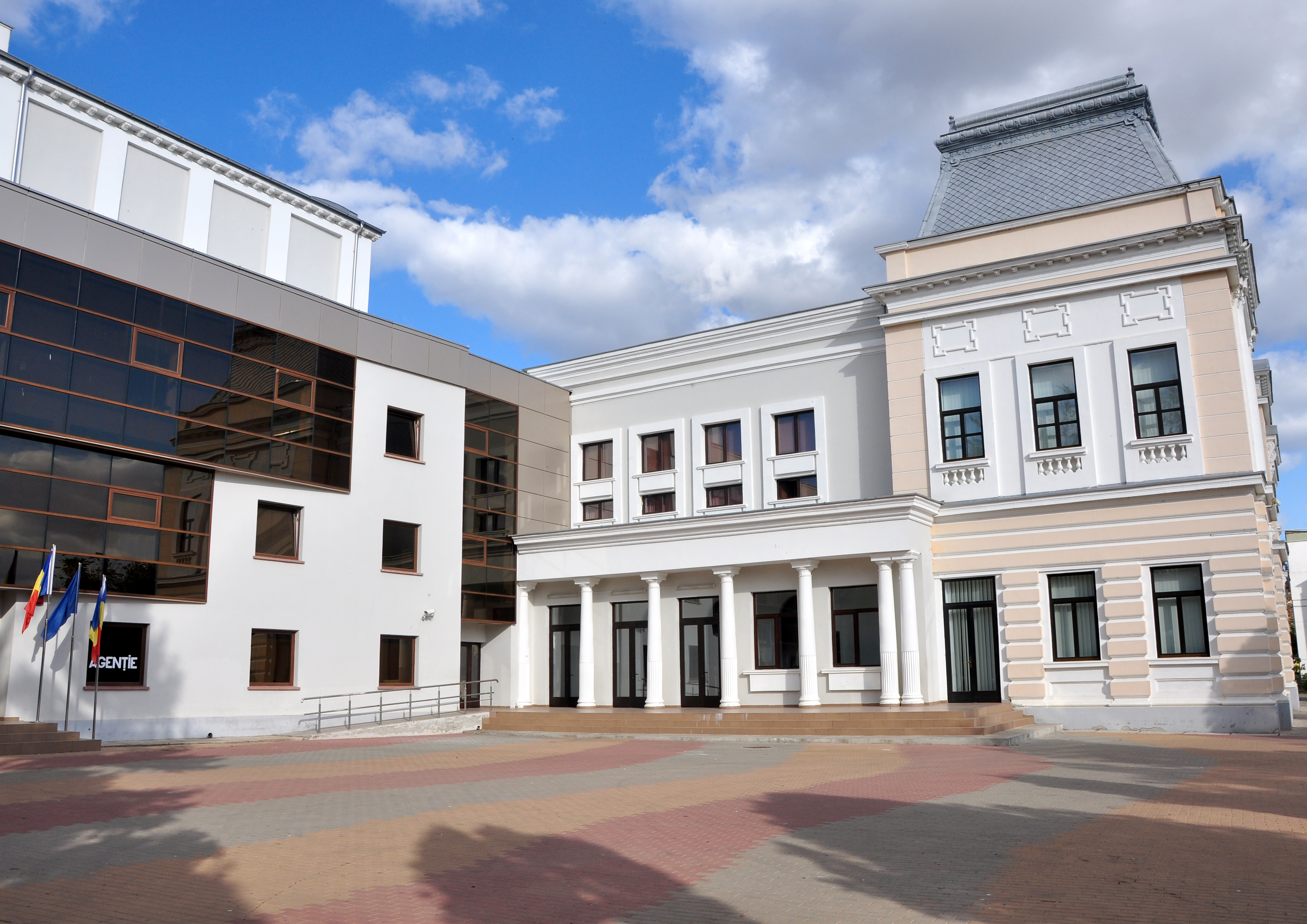 Teatrul "Victor Ion Popa" Barlad functioneaza in fosta sala a Curtii cu Juri a Judetului Tutova, monument istoric ce dateaza din anul 1890.